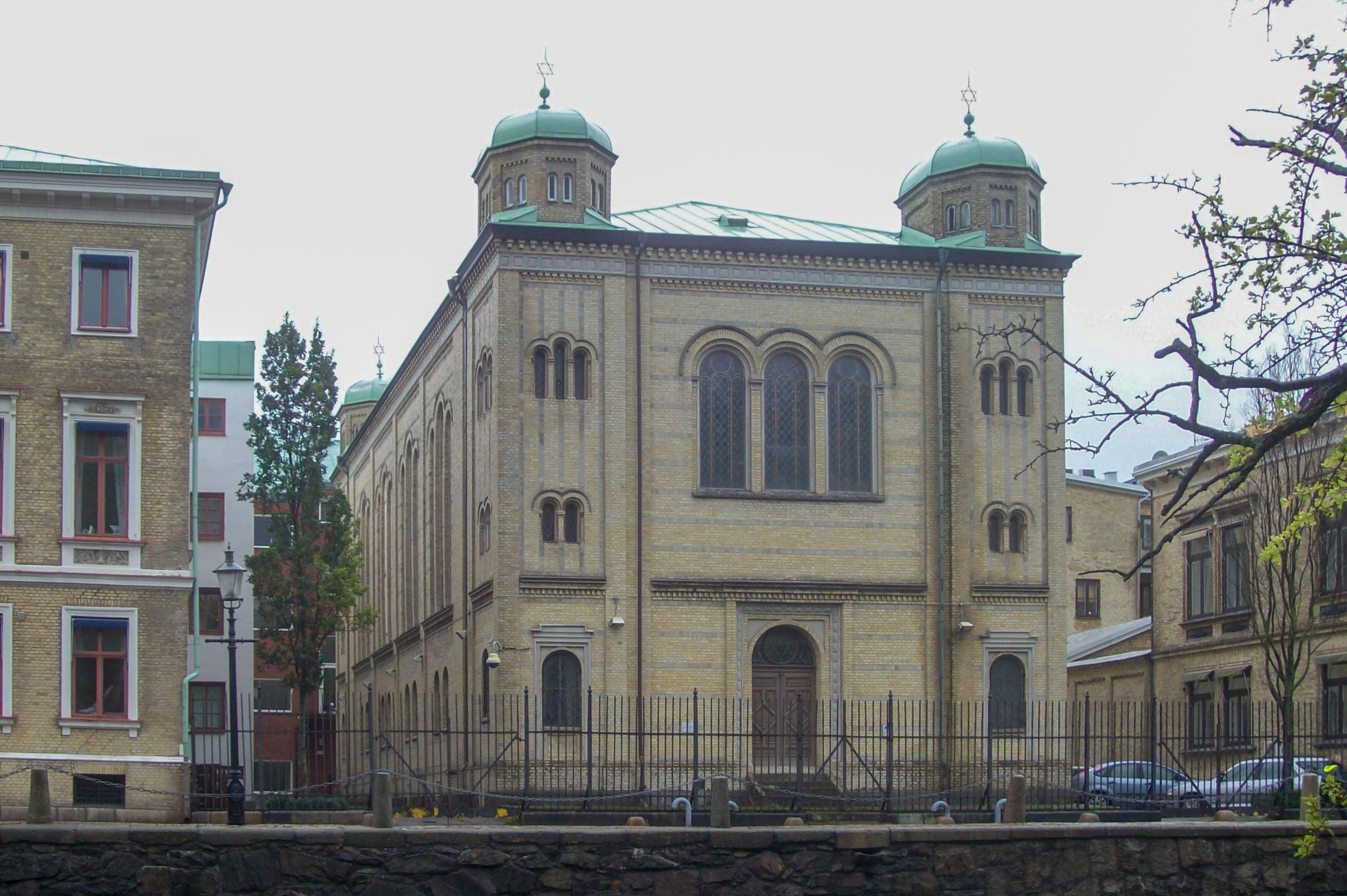 Inom Vallgraven 3:7 Göteborgs Synagoga. Göteborg